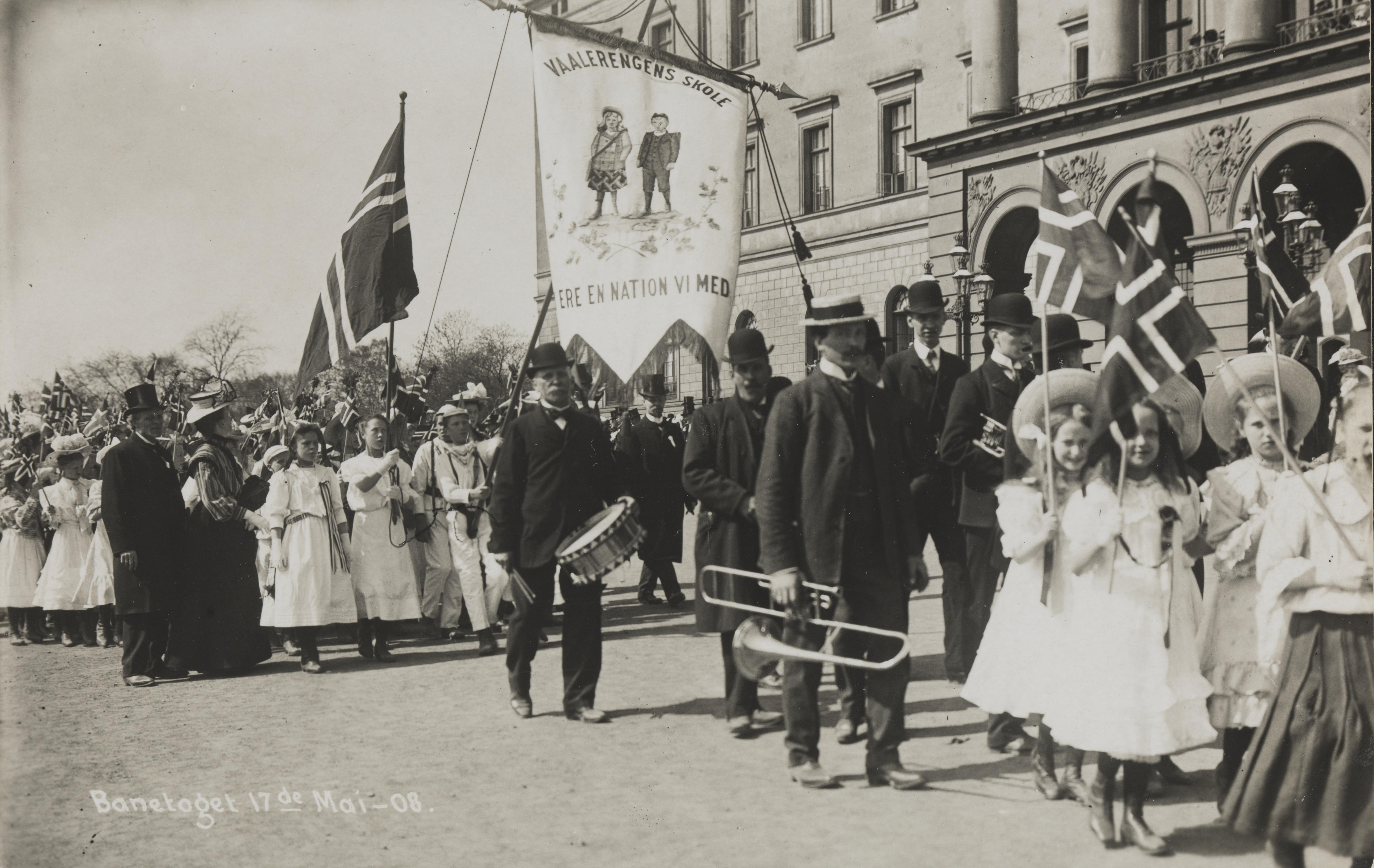 Bildet er hentet fra Nasjonalbibliotekets bildesamling Slottsplassen, Oslo, Oslo